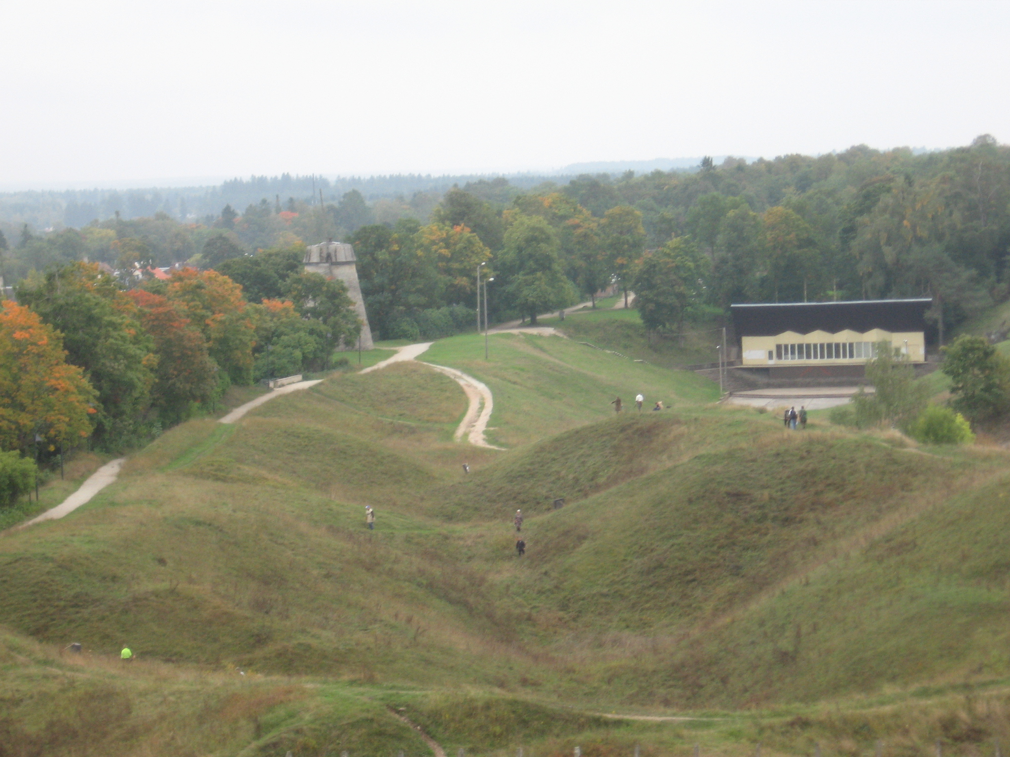 Linnus Vallimägi